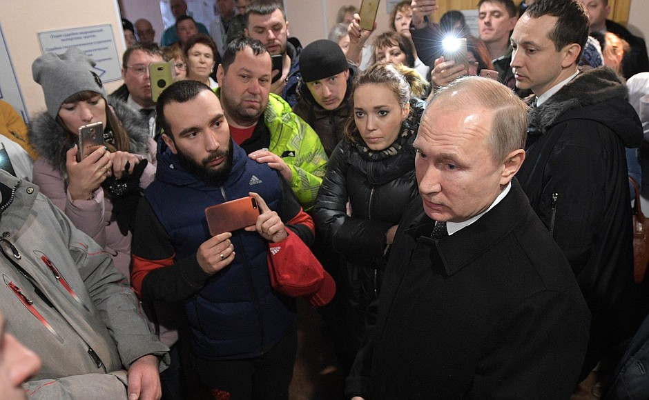 Владимир Путин встретился с инициативной группой граждан, выразивших недоверие к ходу расследования пожара в торговом центре. В состав инициативной группы вошли родственники погибших и пострадавших при пожаре, выразившие недоверие относительно официально озвученной информации о количестве жертв. Встреча прошла в бюро судебно-медицинской экспертизы, куда граждане направились, чтобы сверить списки и убедиться в их соответствии официальным данным.